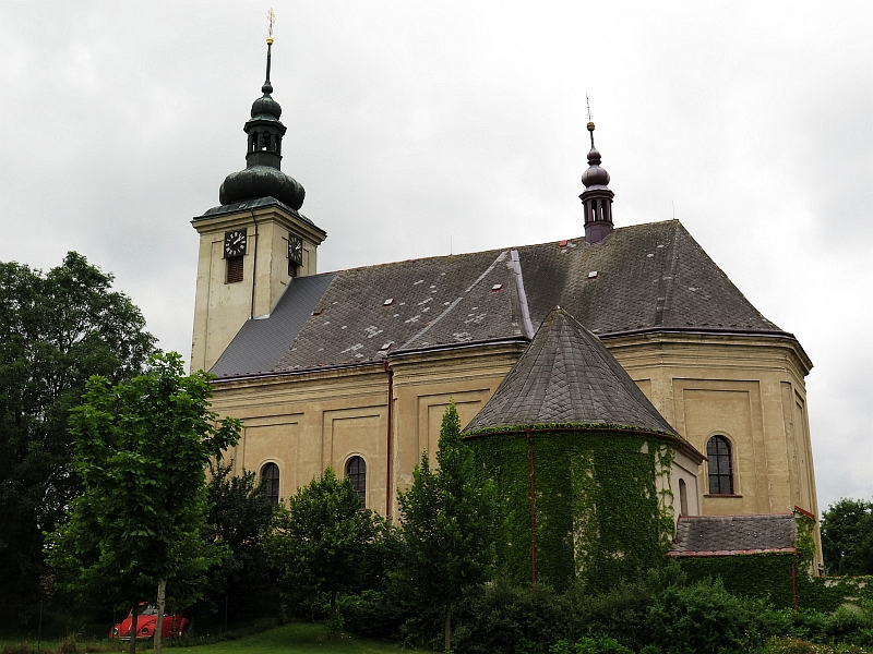 Kostel svatého Jana Křtitele, Tatenice.